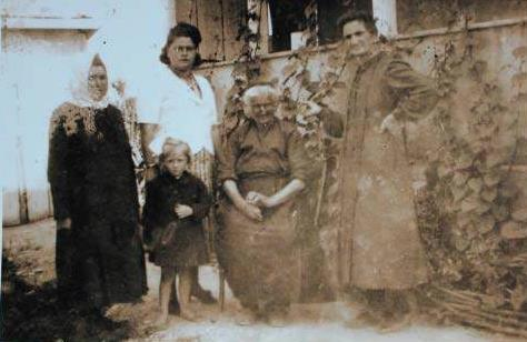 Српски (ћирилица): Први италијански досељеници у Штивор.